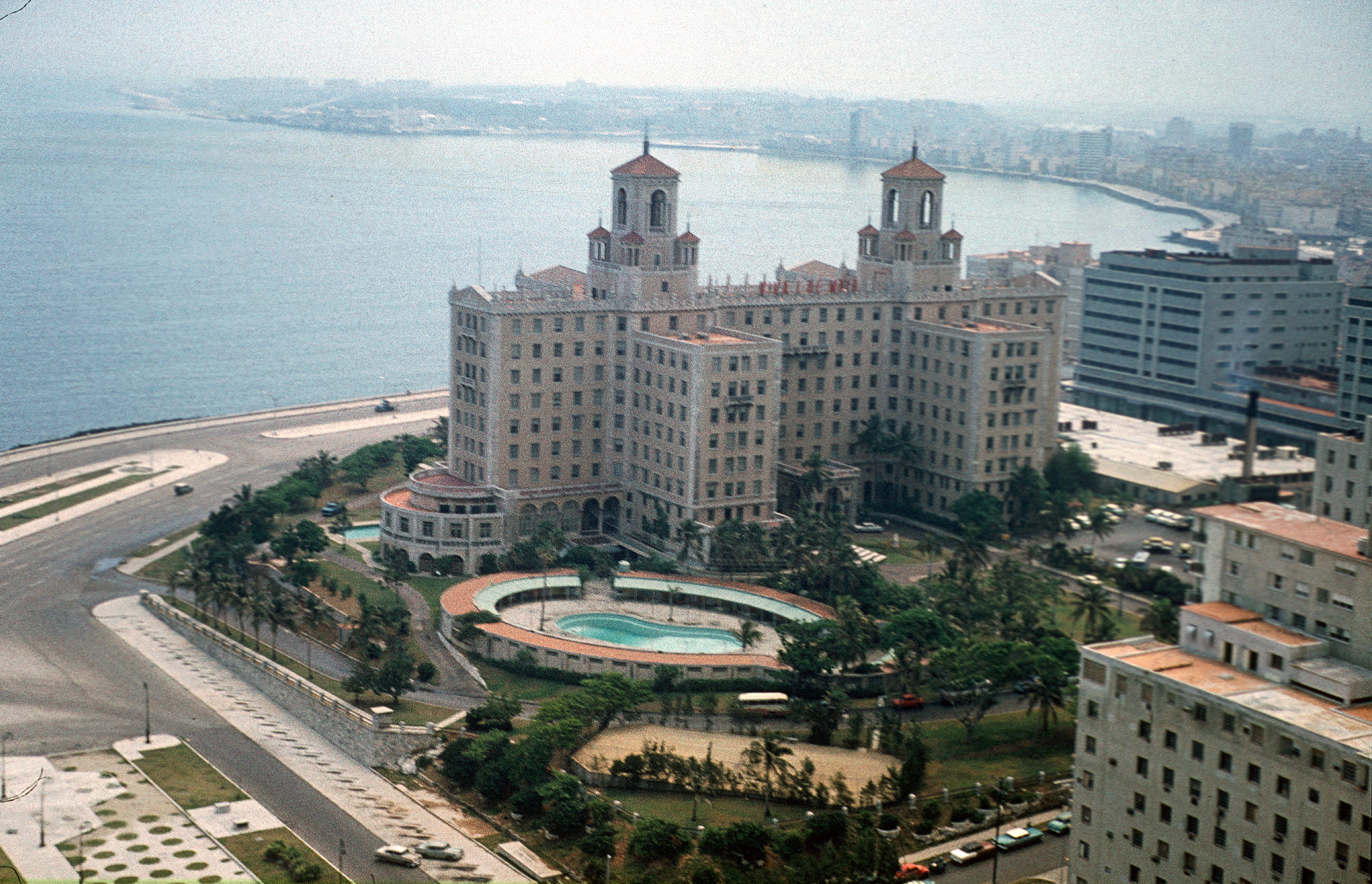 Havanna; Hotel Nacional 1973 Im Hintergrund die Bucht von Havanna, vorne links am Hotel die Uferstraße Malecon, hinten im Dunst die Hafeneinfahrt und das Castillo del Morro, Blickrichtung: Osten